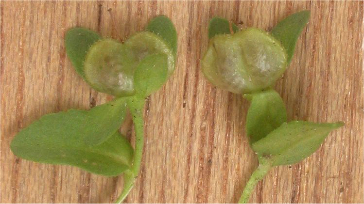 (nl: Tijmereprijs vrucht) Veronica serpyllifolia fruit